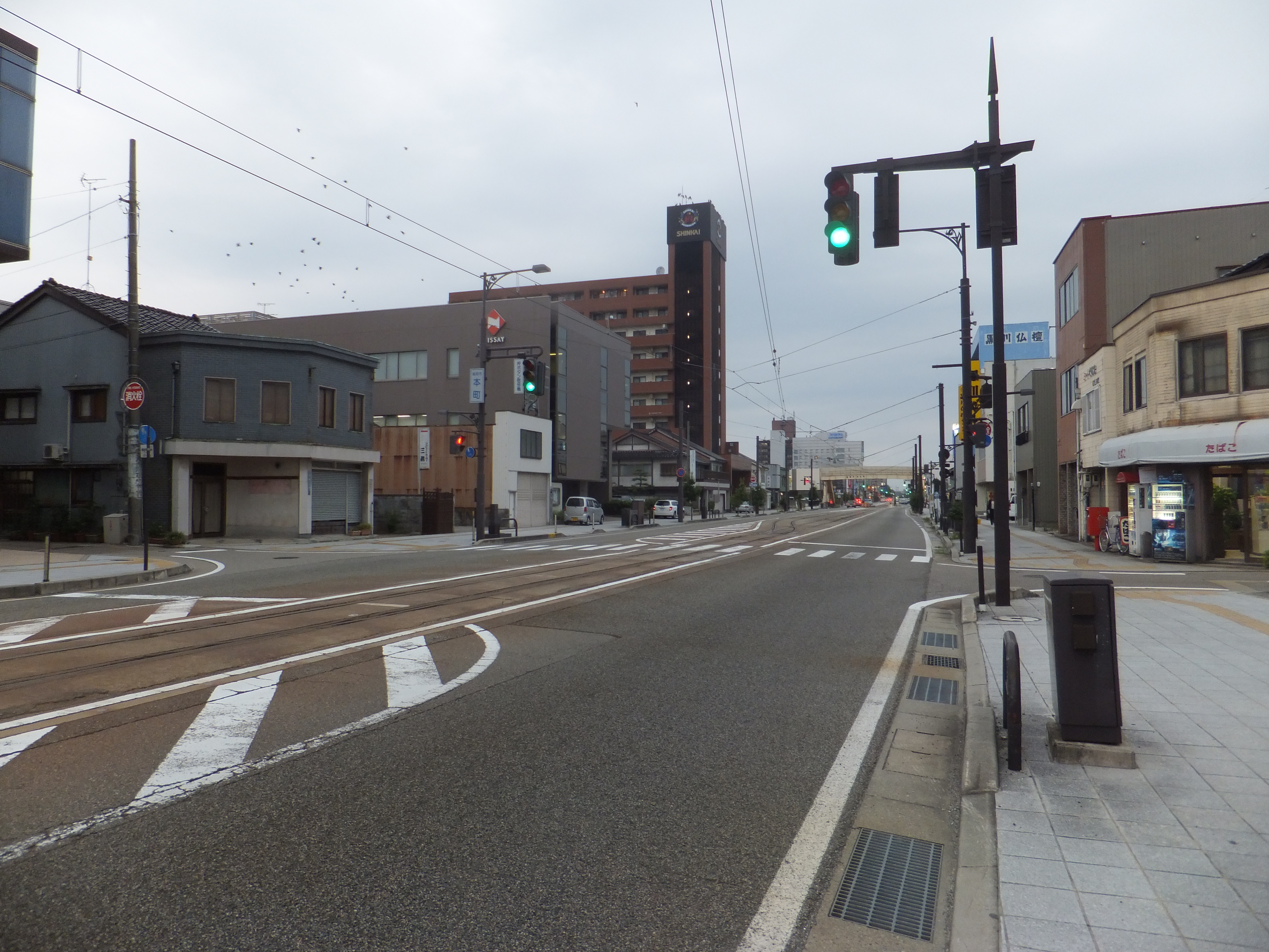 Honmarumachi, Takaoka, Toyama Prefecture 933-0045, Japan